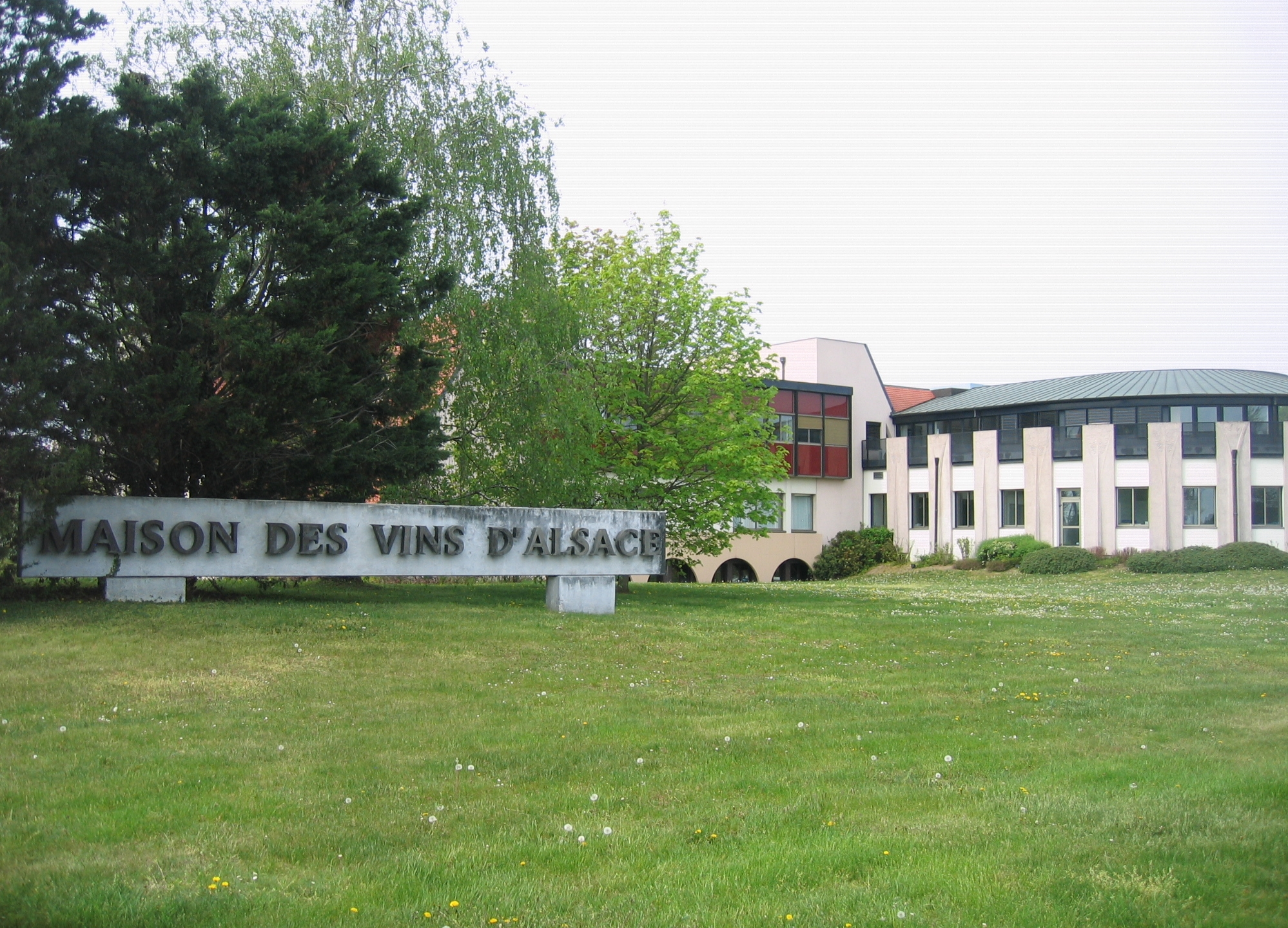 La maison des vins d'Alsace